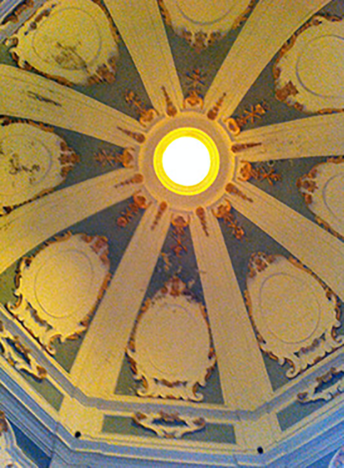 Volta Monte dei Morti di Salerno